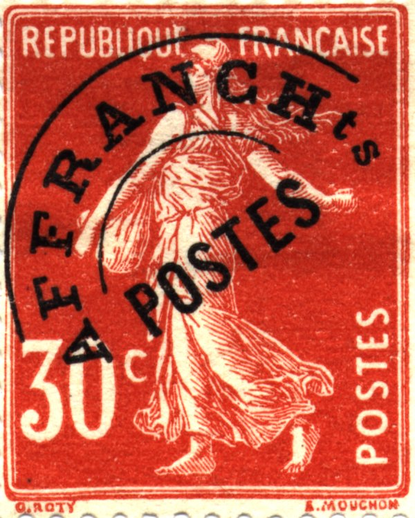 Timbre français, type Semeuse 30 c., préoblitéré